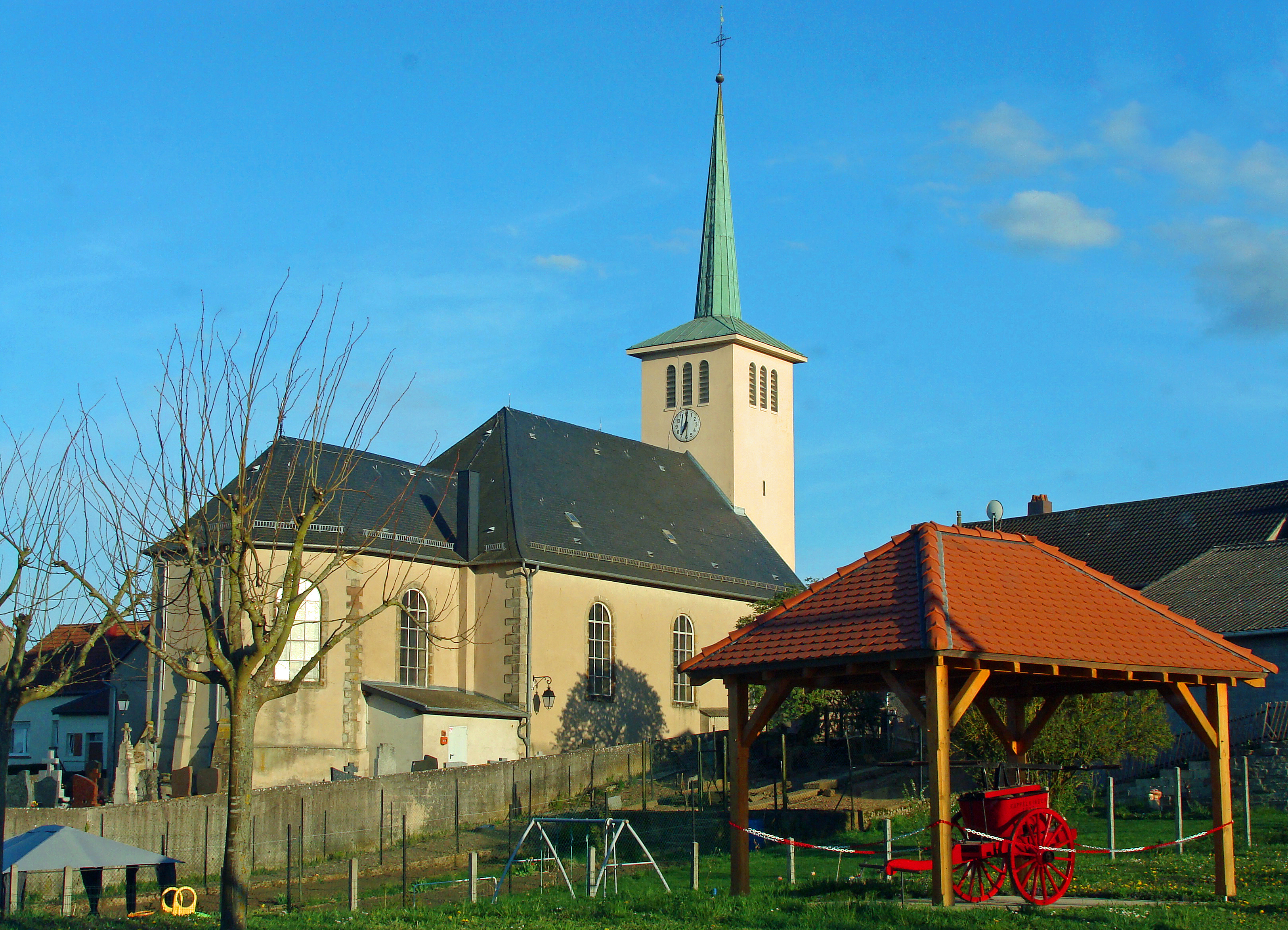 Église Saint-Jacques de Kappelkinger (1743)